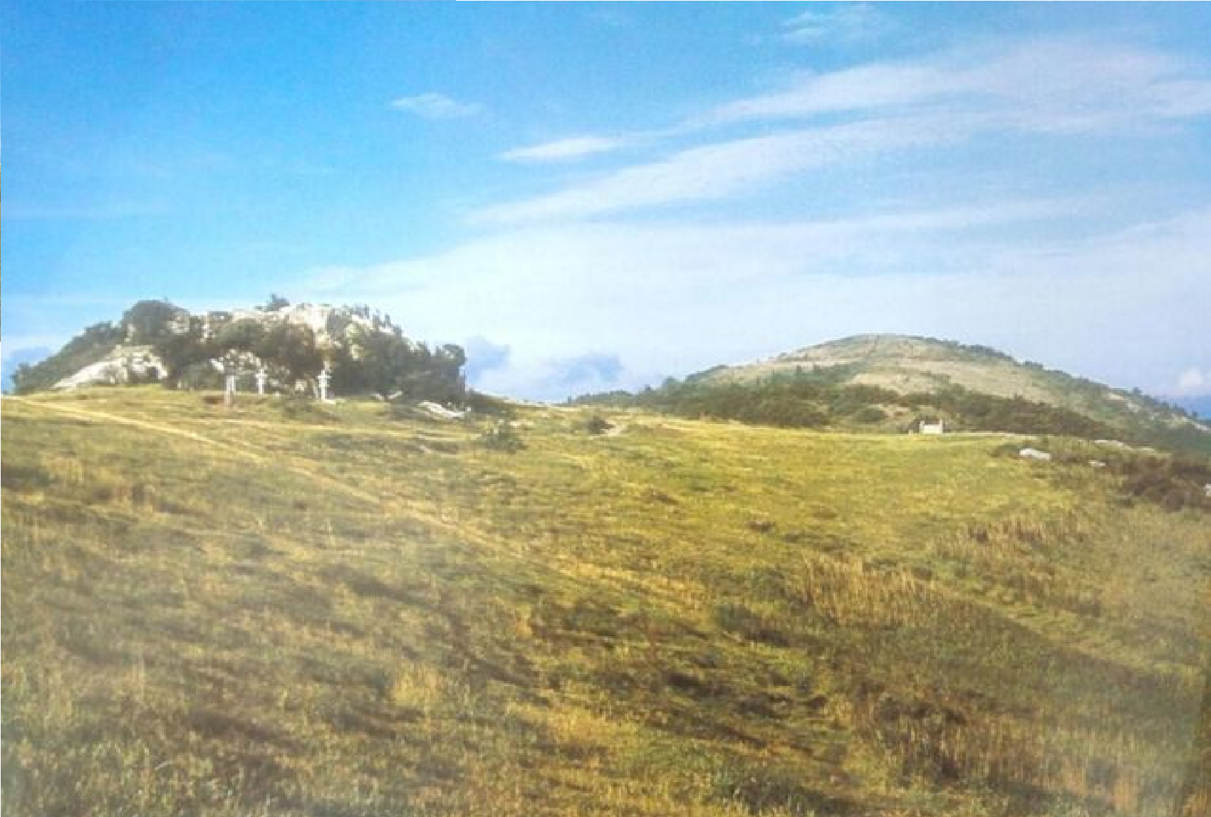 春の生石高原. 右が生石ヶ峰の山頂.